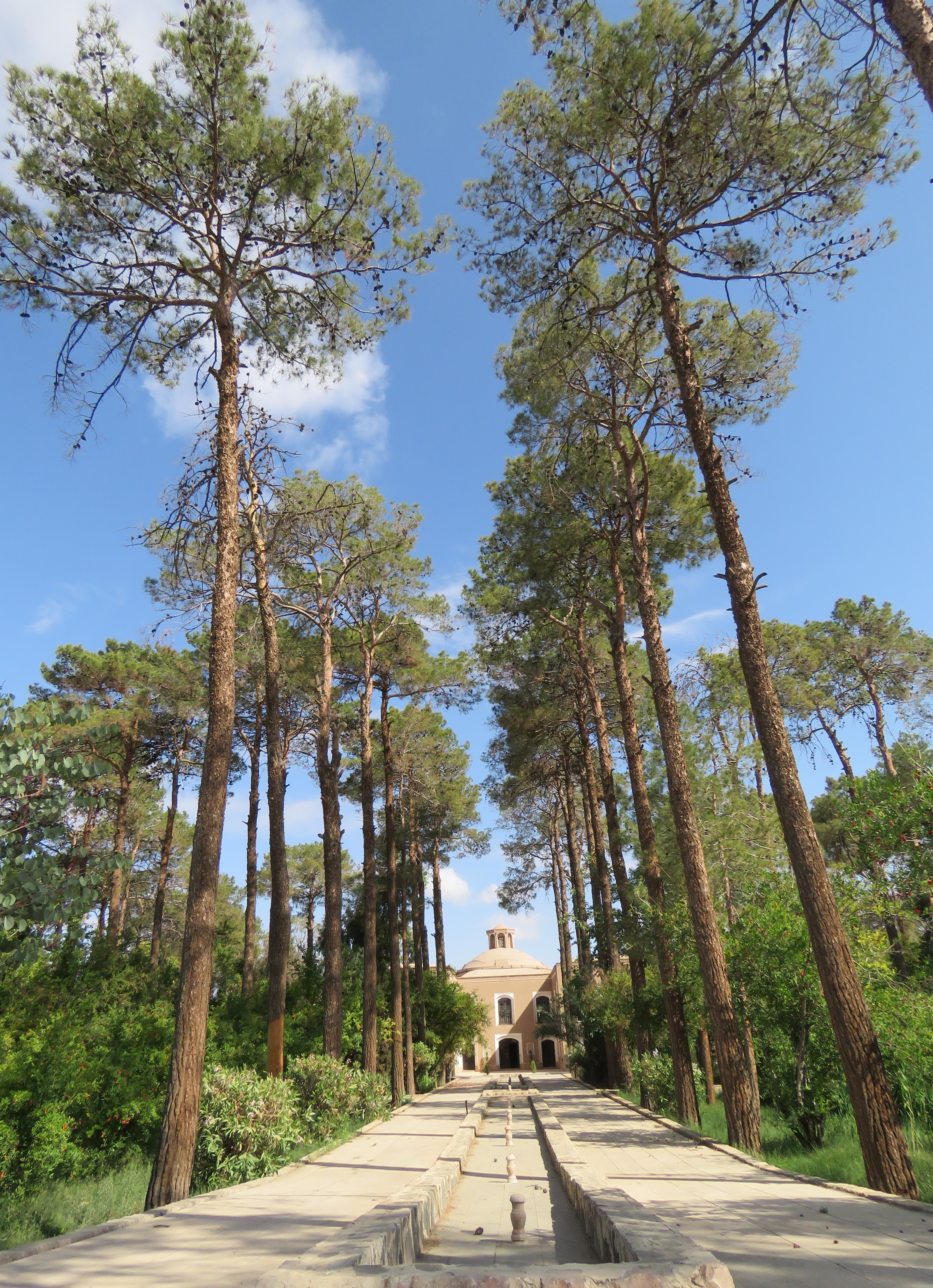 موزه رضا شاه (باغ هرندی)